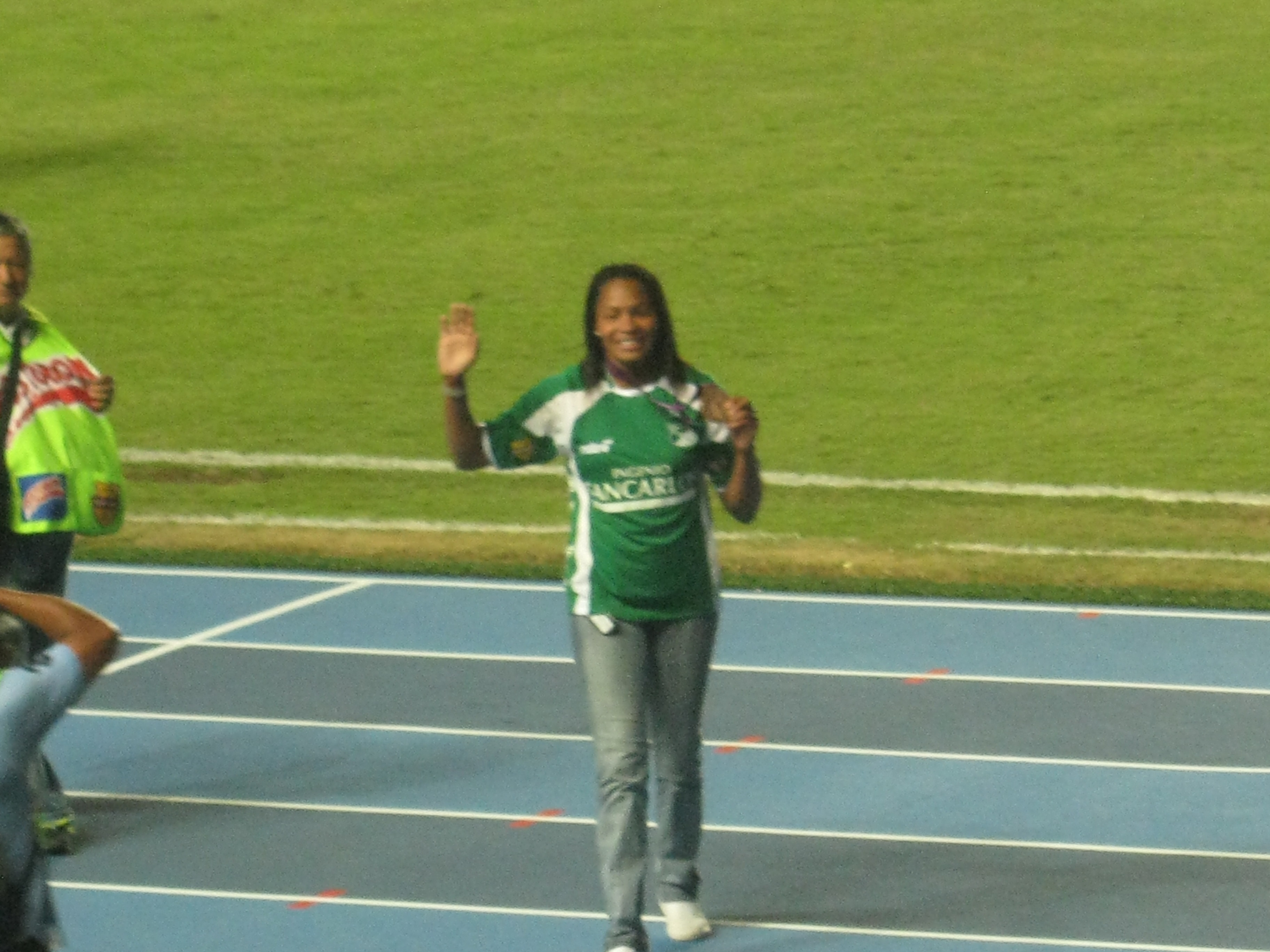 La yudoca Yuri Alvear recibiendo un homenaje departe del Deportivo Cali